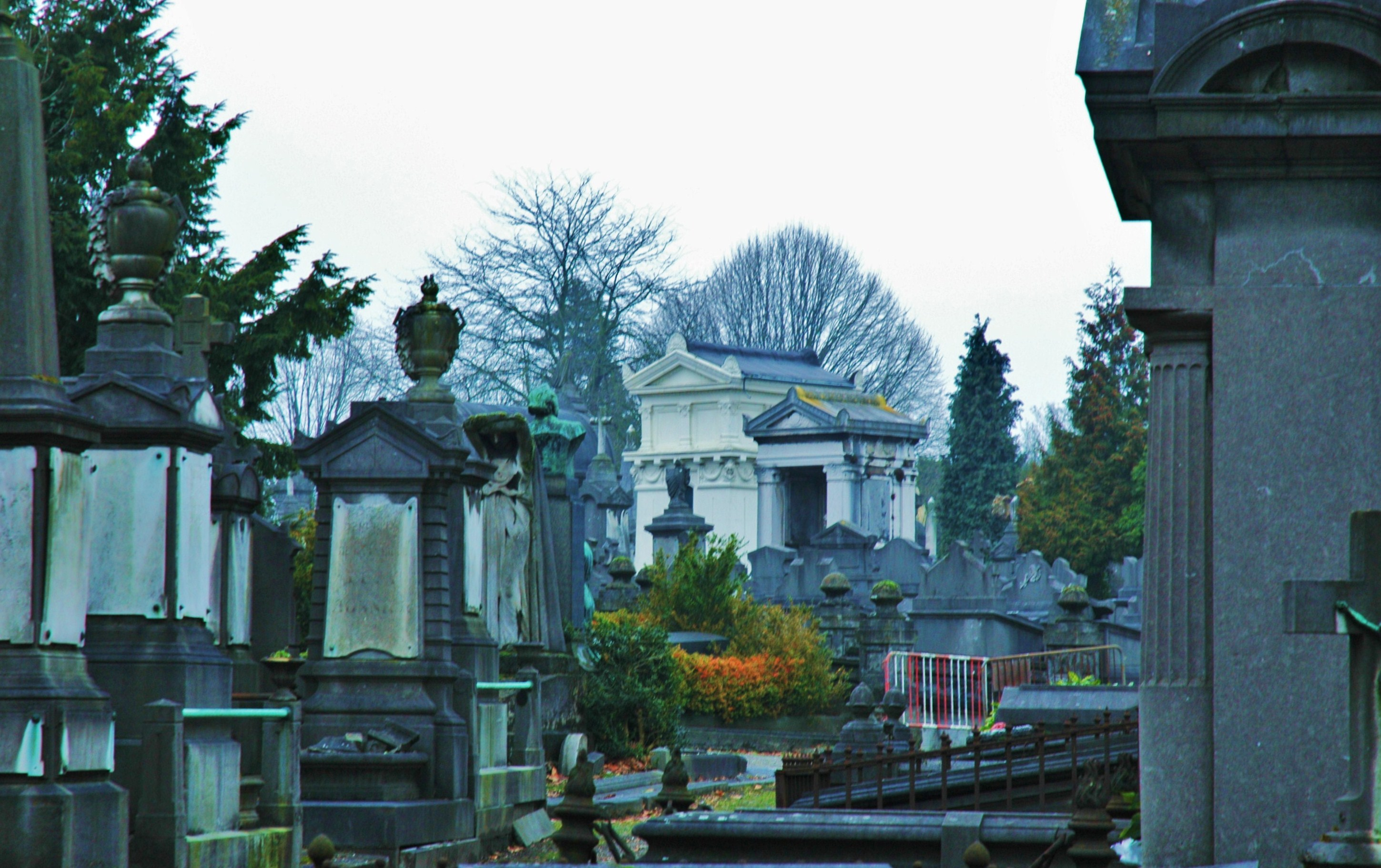 Cimetiere de Laeken, Bruxelles, Belgique